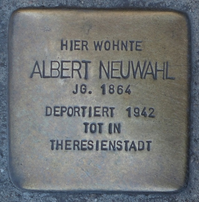 Stolperstein in Soest Brüderstraße 36, Albert Neuwahl